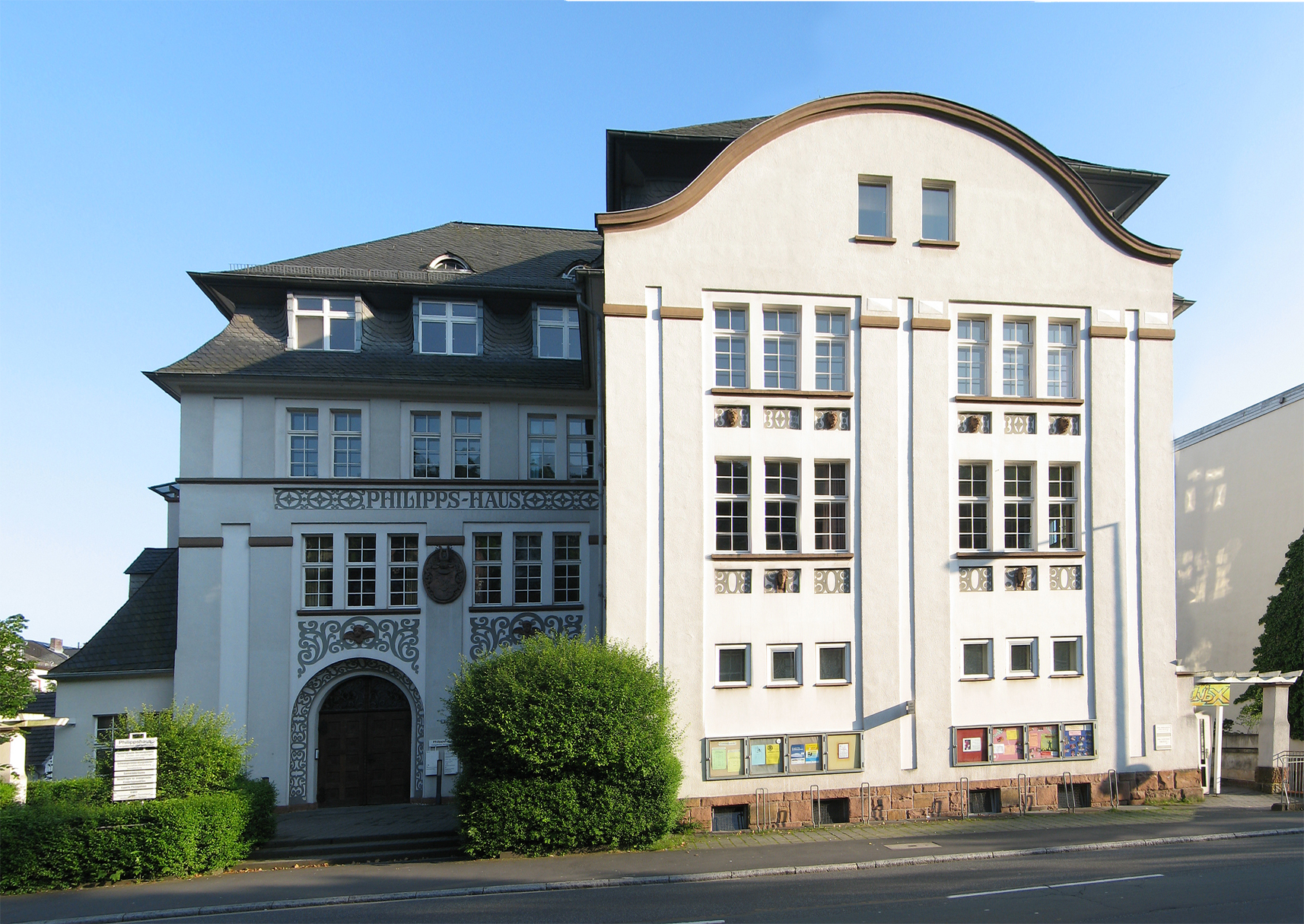 Philipps-Haus, Marburg, Universitätsstr. 32. Das Philippshaus ist durch eine Initiative aus dem Jahr 1904 entstanden. In jenem Jahr feierte die Stadt Marburg den 400. Geburtstag des Landgrafen Philipp. Aus diesem Anlass trafen sich damals zu verschiedenen Anlässen Vertreter aus der lutherischen und der reformierten Kirchengemeinde. Man wollte sich an die Offenheit des Landgrafen gegenüber den reformatorischen Bestrebungen Luthers in Wittenberg wie auch Zwinglis in Zürich erinnern.